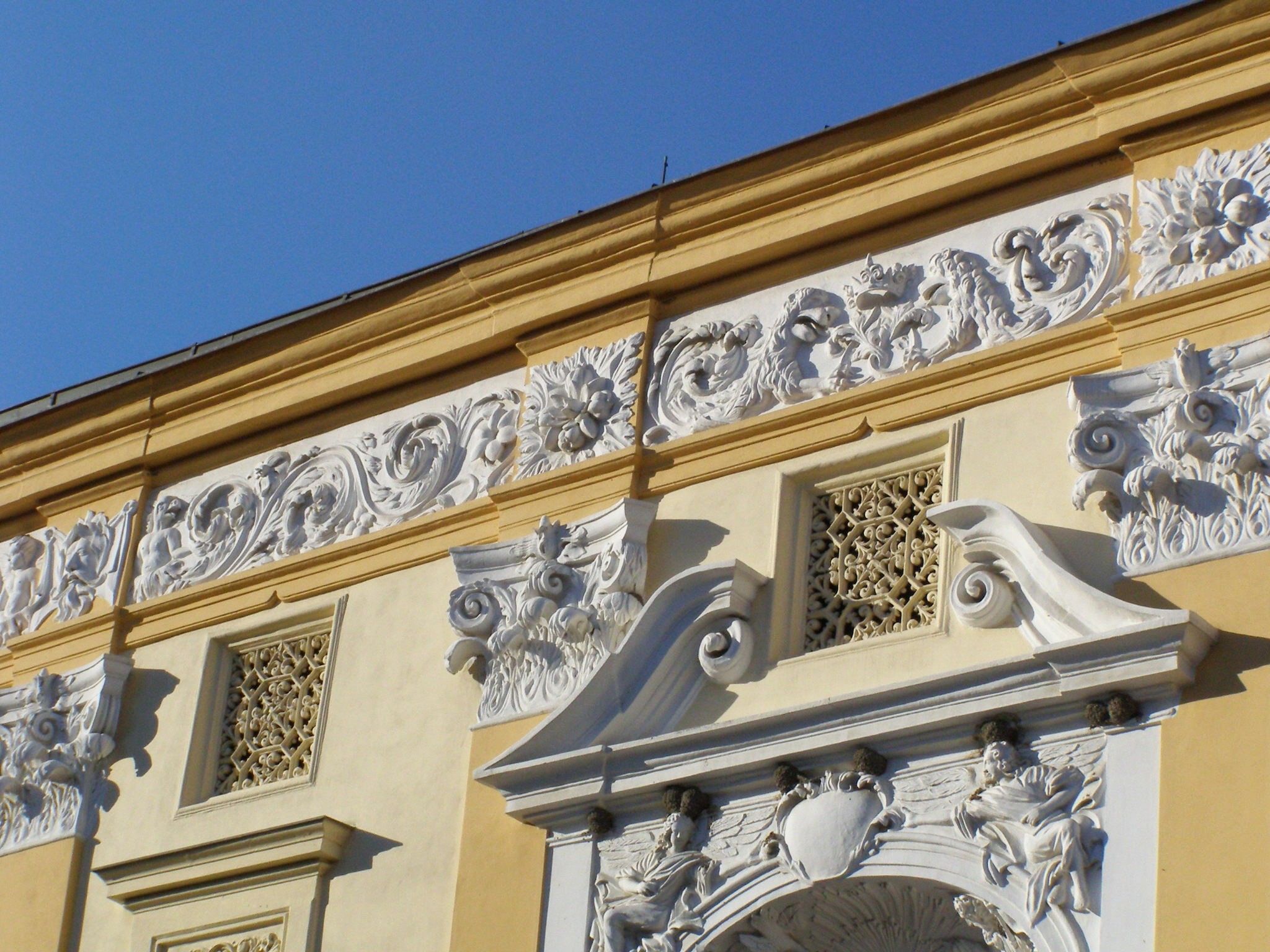 Litovel - historický Langův dům na náměstí Přemysla Otakara II.